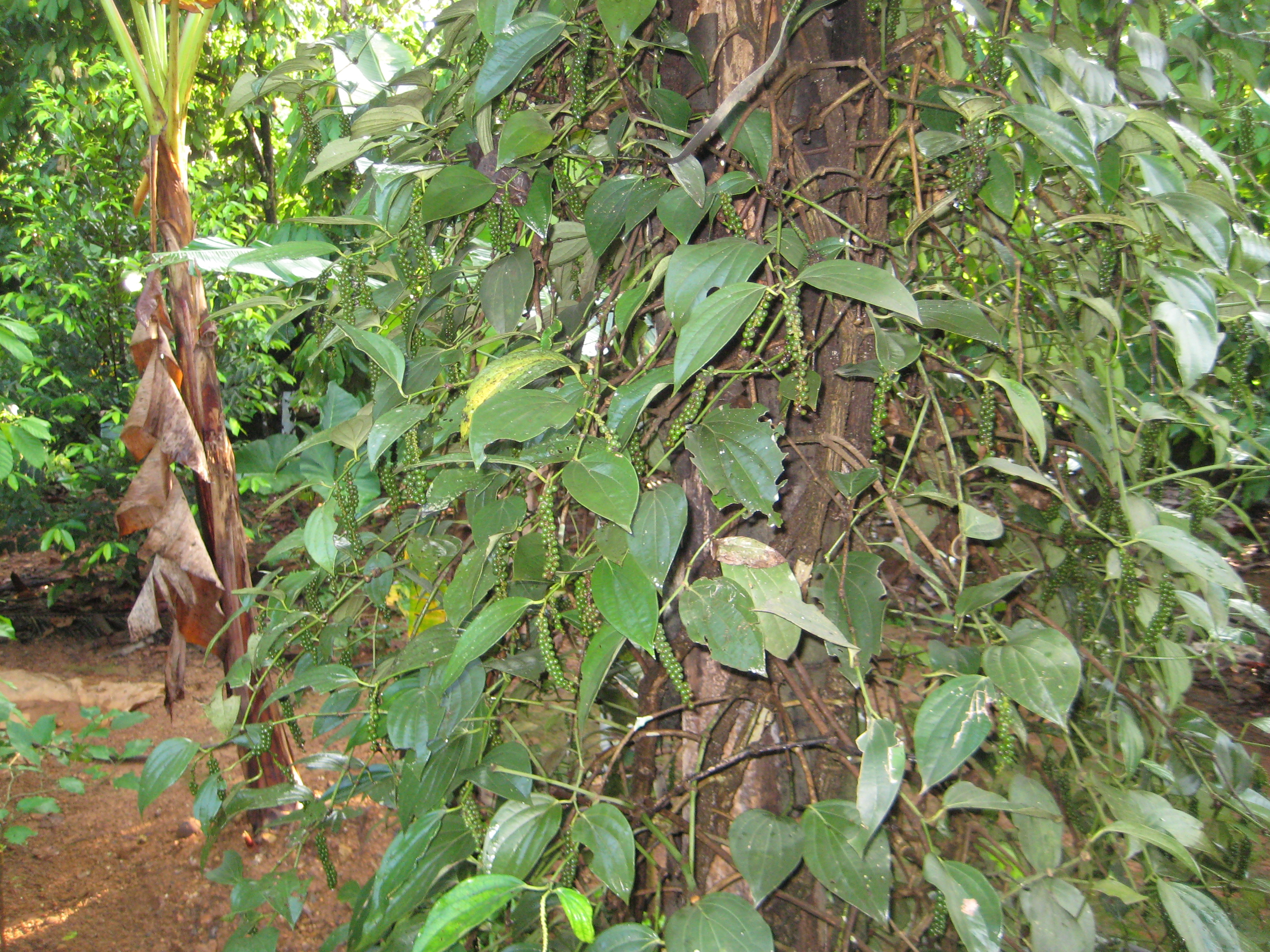 കറുത്ത പൊന്ന് എന്നു വിശേഷിപ്പിക്കാറുള്ള കുരുമുളക്‌ സുഗന്ധവ്യഞ്ജനങ്ങളിൽ രാജാവ് എന്നാണ് അറിയപ്പെടുന്നത്. ഇത് ലോകത്തിലെ ഏറ്റവും പഴക്കവും സുപ്രസിദ്ധിയാർജ്ജിച്ചതുമായ സുഗന്ധവ്യഞ്ജനവും, കേരളത്തിലെ ഒരു പ്രധാന നാണ്യവിളയുമാണ്. തെക്കേ ഇന്ത്യയിലെ വനങ്ങളിൽ നിന്നാണ് കുരുമുളക് വള്ളി ചെടി ഉത്ഭവിച്ചതെന്ന് വിശ്വസിക്കപ്പെടുന്നു. കേരളത്തിന്റെ വ്യാപരചരിത്രത്തിൽ കുരുമുളകിന് പ്രധാനസ്ഥാനമുണ്ട്. ഇംഗ്ലീഷിൽ Black pepper എന്ന പേരുണ്ടായത് സംസ്കൃതത്തിലെ‍ പിപ്പലിയിൽ നിന്നുമാണ്. ഗ്രീക്ക് ഭാഷയിൽ പെപ്പറിയും, ലാറ്റിൻ ഭാഷയിൽ പിപർ എന്നും, ജർമൻ ഭാഷയിൽ ഫെഫ്ഫര് എന്ന പേരിലും അറിയപ്പെടുന്നു‍, തീരെ അപ്രധാനമായ ഒരു ഭൂവിഭാഗമായ കേരളത്തെത്തേടി അതിപ്രാചീനമായ കാലത്ത്‌ തന്നെ യവനരും റോമാക്കാരും തേടി എത്തിയതും പിന്നീട്‌ അവർ വന്ന വഴിതേടി യൂറോപ്പിലെ നിരവധിരാജ്യക്കാരും കേരളത്തിലെത്തിയതും കേരളത്തിൽ എന്നു തന്നെയല്ല ഇന്ത്യ മൊത്തം അടക്കിഭരിച്ചതും, കുരുമുളകിന്റെ യഥാർത്ഥ ഉറവിടം മലബാർ തീരം ആണെന്നുള്ള അറിവ് പാശ്ചാത്യർക്ക് മാർക്കോ പോളോ എന്ന സഞ്ചാരിയുടെ ഓർമ്മക്കുറിപ്പുകളിൽ നിന്നും ലഭിച്ചത് മൂലമായിരുന്നു. ഇന്ന് കുരുമുളക്‌ ഉപയോഗിച്ച്‌ സ്പ്രേ വരെ ഉണ്ടാക്കുന്നു. ഭൂമധ്യരേഖക്കടുത്തുള്ള ഉഷ്ണരാജ്യങ്ങളിലാണ്‌ കുരുമുളക്‌ വളരുന്നത്‌. വള്ളിച്ചെടിപോലെ പടർന്നു കയറുന്ന ഇനമാണ്‌ ഇതിൽ പ്രധാനം. പച്ചക്കുരുമുളക്‌ കുലകളിലായി ഉണ്ടാകുകയും അത്‌ ഉണക്കി കറുത്ത കുരുമുളകും തൊലി കളഞ്ഞ്‌ വെള്ളക്കുരുമുളകും ഉണ്ടാക്കുന്നു. കുരുമുളക് ലോക വ്യാപകമായി ഭക്ഷണത്തിന് എരിവ് നൽകുന്നതിന് ഉപയോഗിക്കുന്നുണ്ട്. ഔഷധഗുണമേറെയുള്ള കുരുമുളക്‌ മറ്റു രാജ്യങ്ങളിലെന്നപോലെ ഇന്ത്യയിലും വയറുസംബന്ധമായ വിവിധ അസുഖങ്ങൾക്ക്‌ മരുന്നായി ഉപയോഗിക്കുന്നുണ്ട്‌. കുരുമുളക് വ്യാപകമായി കൃഷി ചെയ്യുന്ന കേരളത്തിൽ കുരുമുളകിനേക്കാൾ കൂടുതലായി എരിവിനുവേണ്ടി ഉപയോഗിക്കുന്നത് നീളത്തിലുള്ള മുളകുകളാണ്.